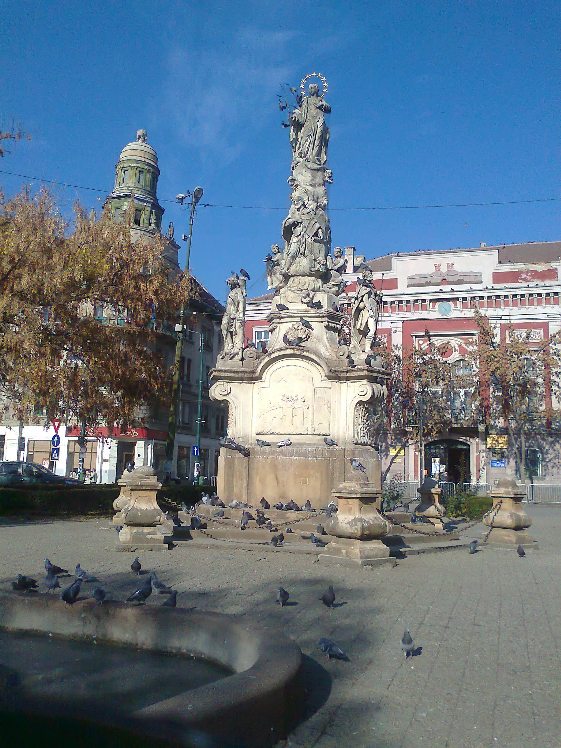 Statuia Sfantului Nepomuk din Piata Libertatii Timisoara